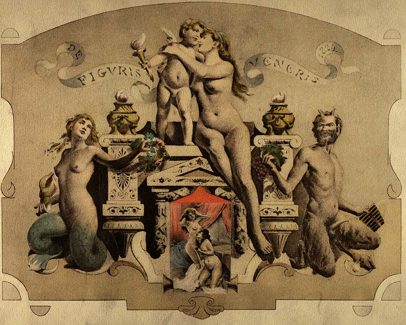 De Figuris Veneris, illustration